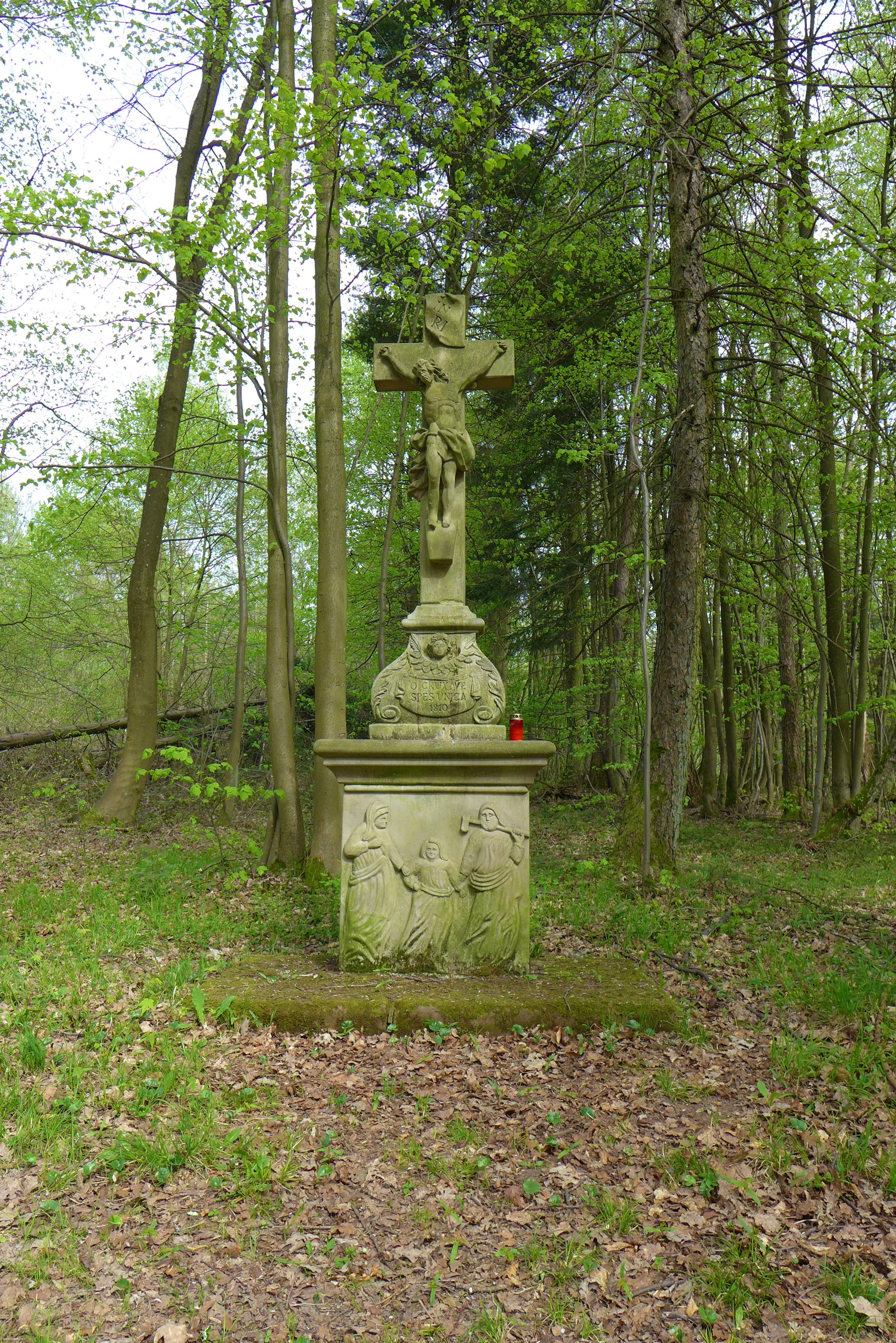 Wallerfangen, Limberg, Wegekreuz von 1810 mit Relief der Heiligen Familie im Sockelbereich